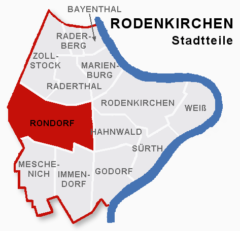 Lage des Stadtteils Rondorf im Stadtbezik Rodenkirchen